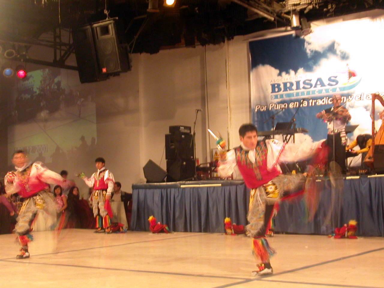 Una de las zonas mas pobres de Perú y Latinoamerica tiene sorprendentemente el record en bailes regionales, este las tijeras, hace pensar que estamos ante acrobatas mas que ante bailarines... Ironico pero hasta los de alli tienen que sudar mas para bailar. Licensing